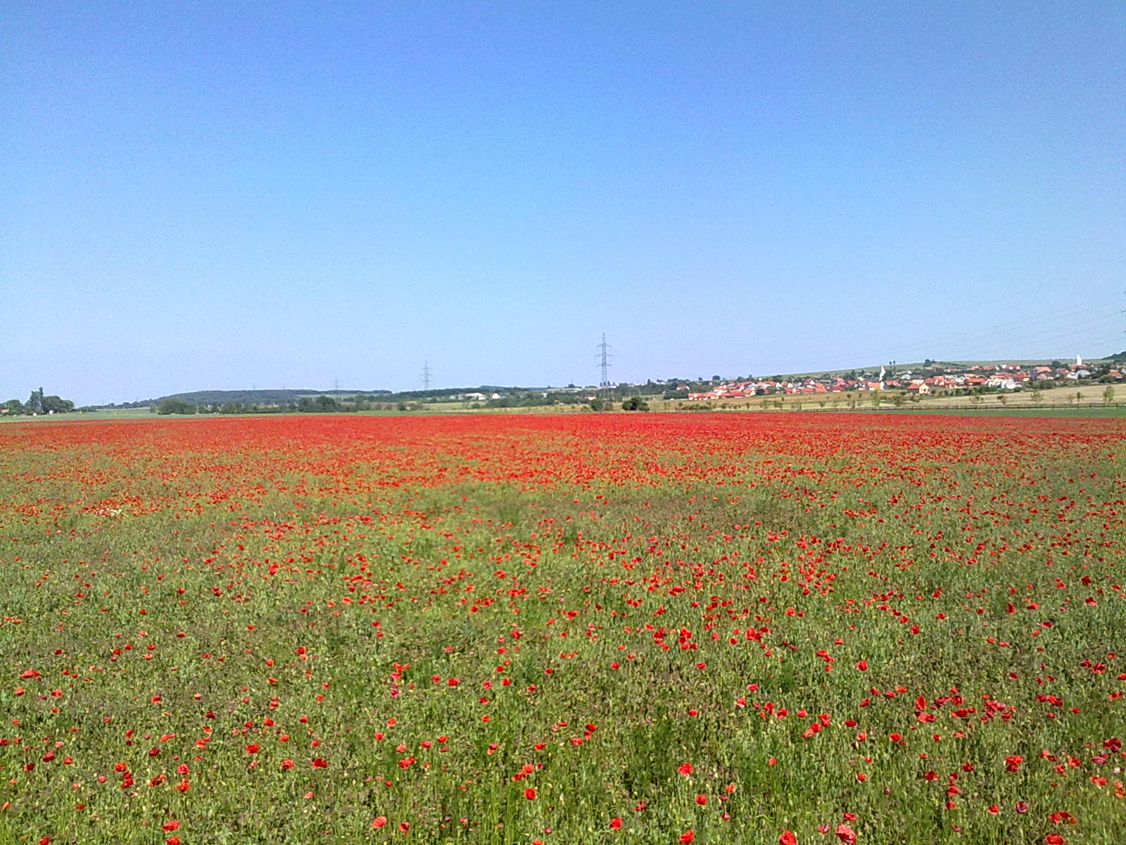 Végtelen pipacs 3/2